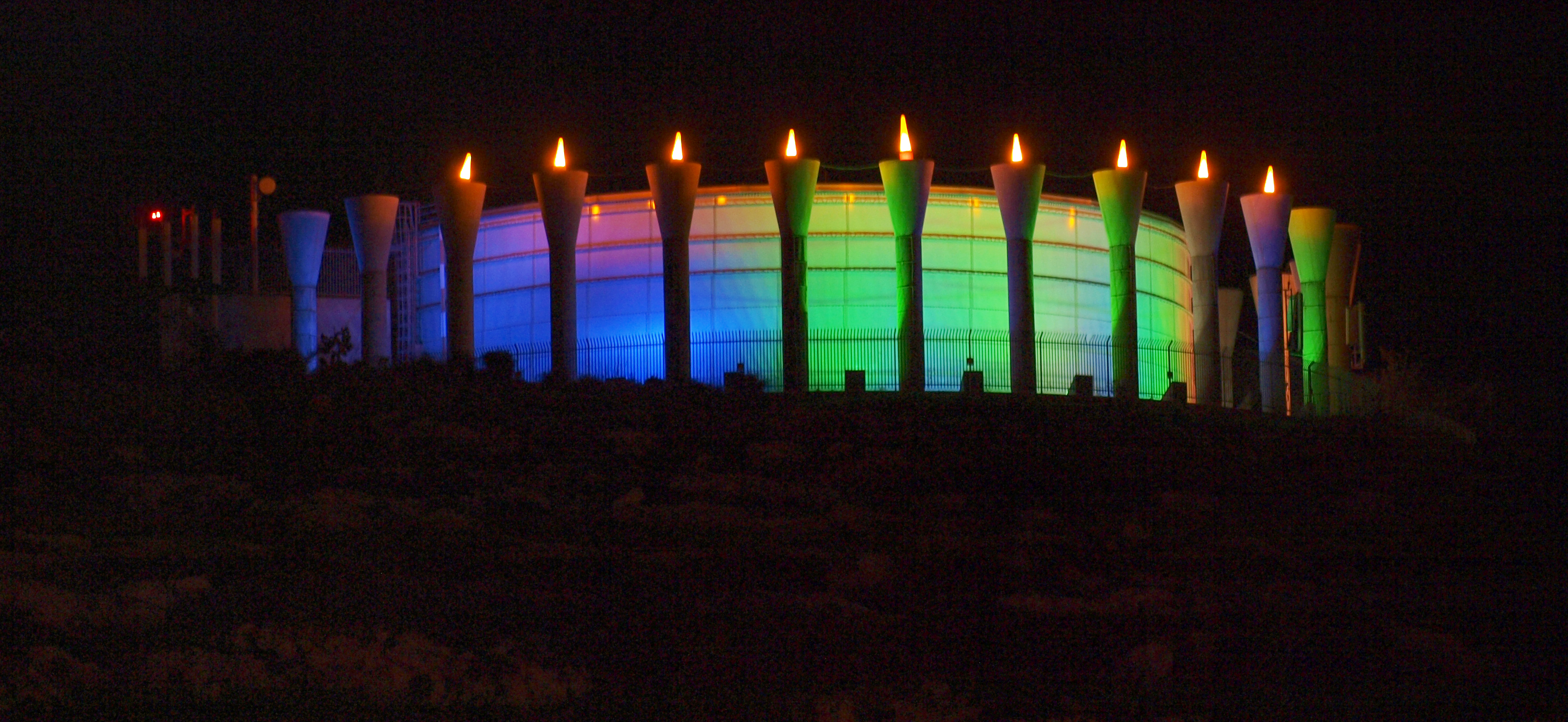 מיכל המים שעל גבעת התיתורא, מודיעין - בנר שמיני של חנוכה